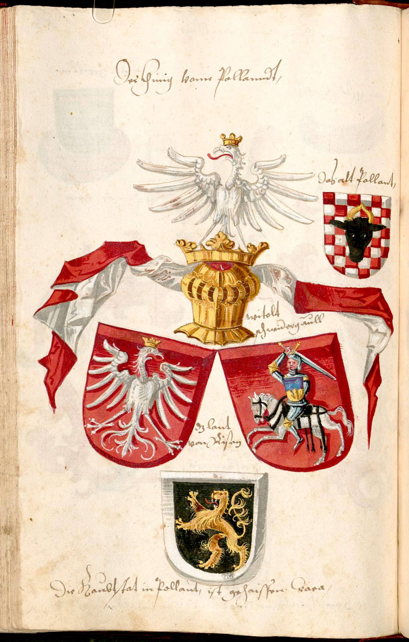 Беларуская (тарашкевіца): Герб Пагоня (Pahonia)